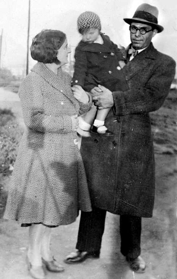 Émilienne Morin, Buenaventura Durruti et Colette Durruti en février 1936 à Barcelone (Espagne). [Image recadrée : voir en ligne les sources]